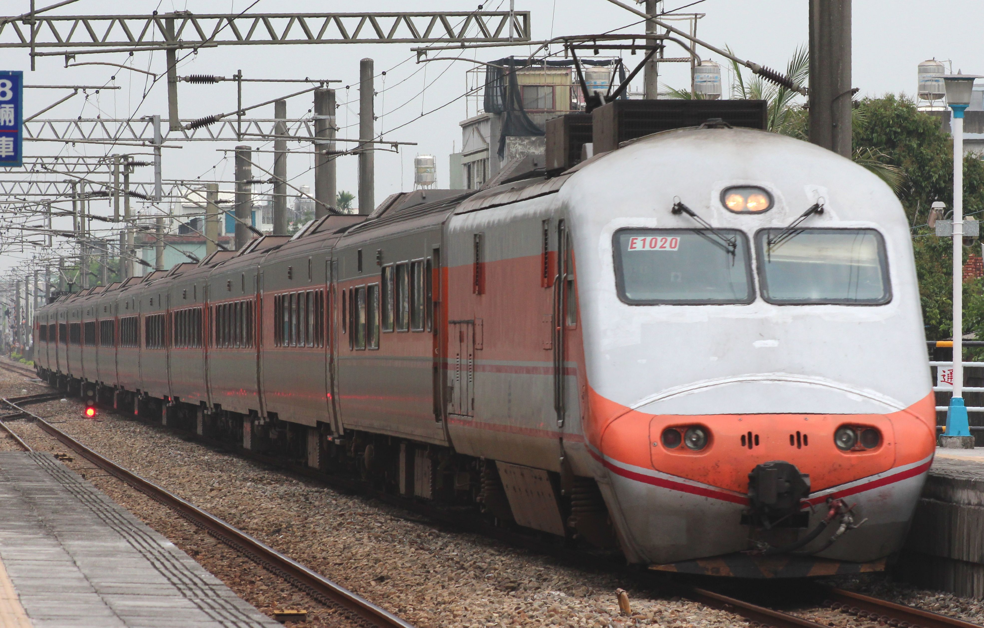 台湾鉄路管理局E1000型電車